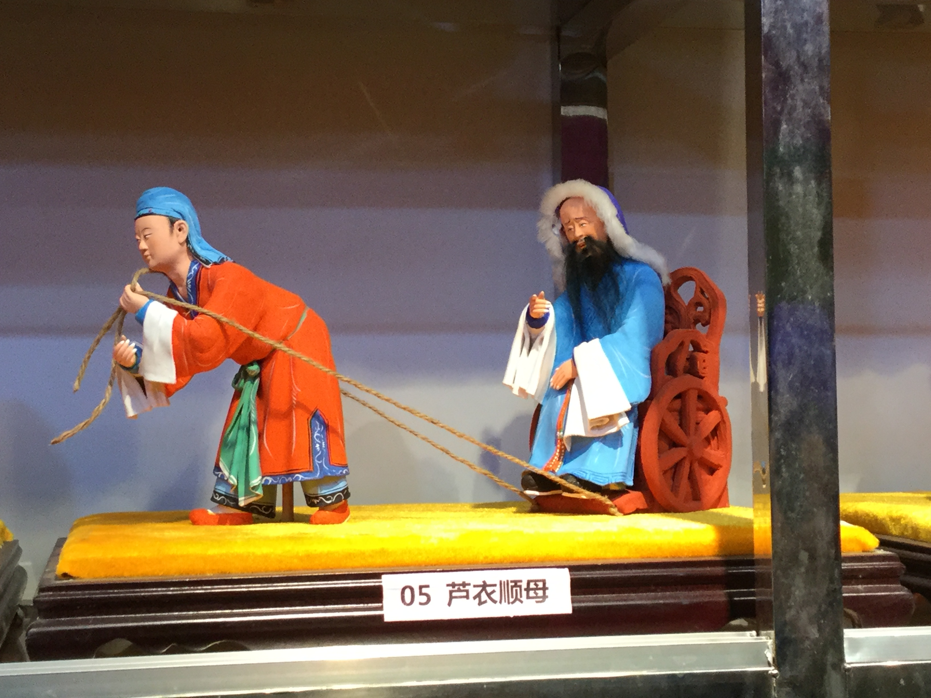 翁仔灯《芦衣顺母》，摄于2018年3月2日。